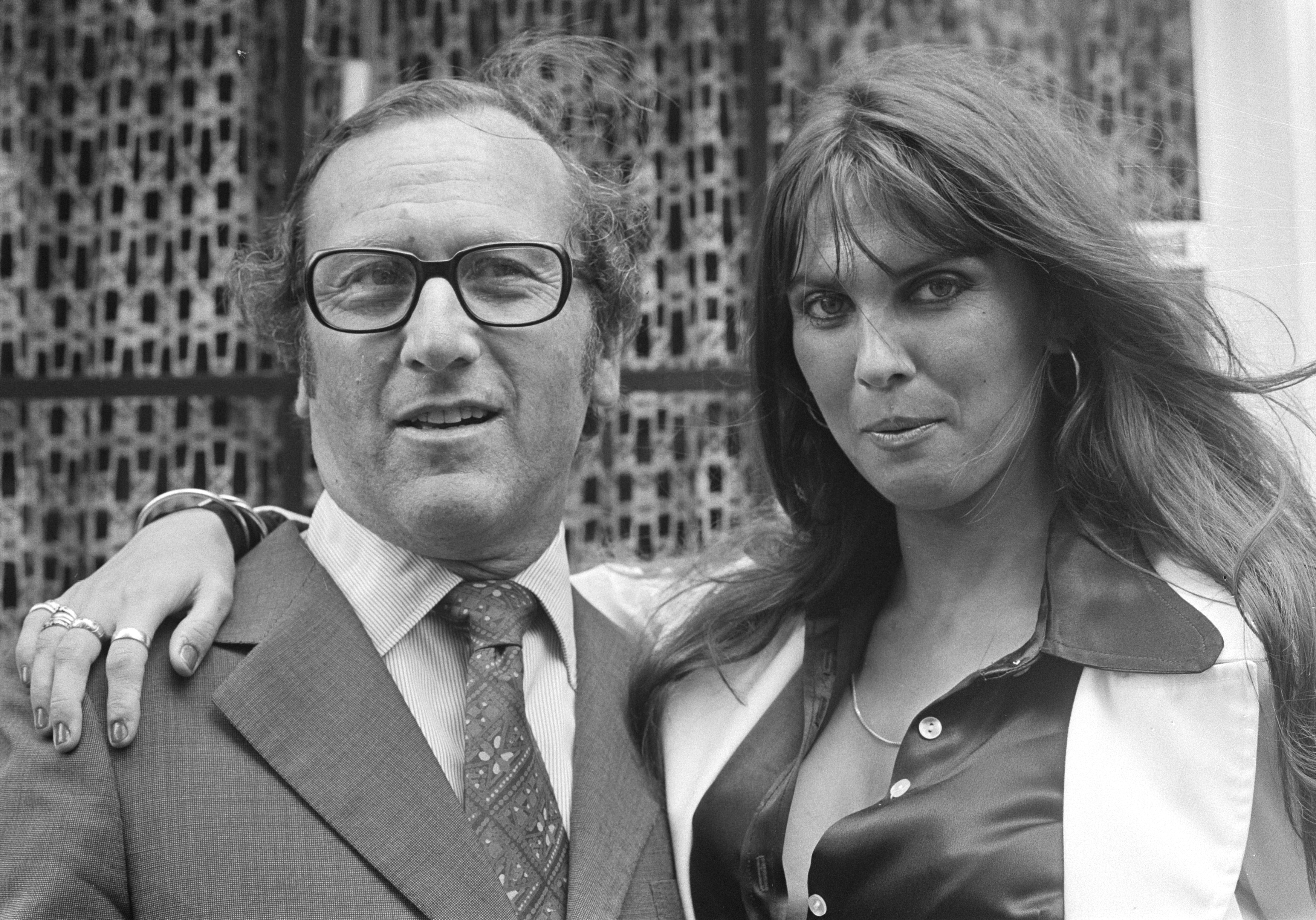 Actrice Caroline Munro in Amsterdam n.a.v. premiere "The Golden Voyage of Sinbad" ; Caroline Munro (r) met filmproducent Charles H. Schneer